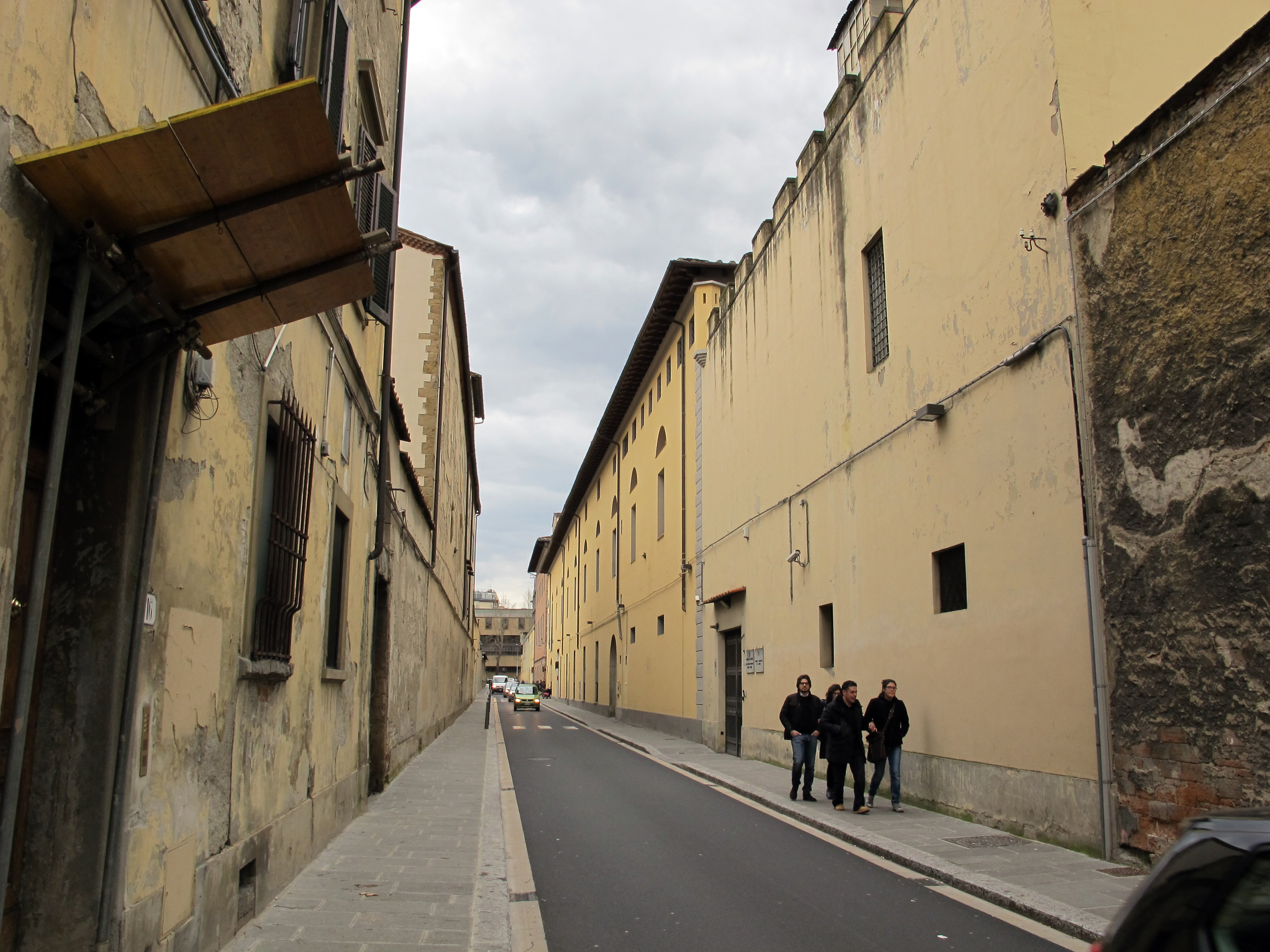 Via dell'agnolo, ultimo tratto fra le murate e santa verdiana